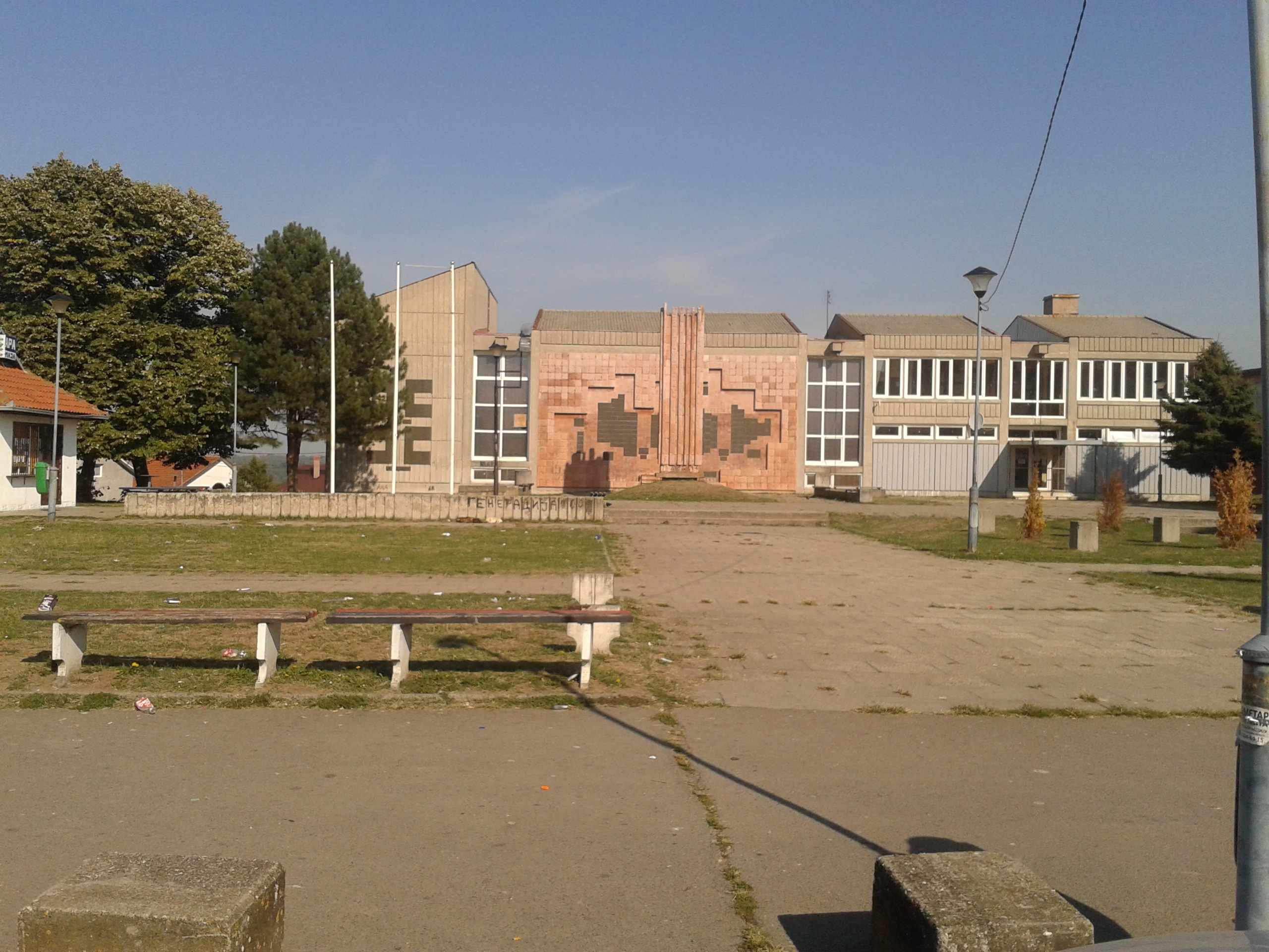 Centar Vranica , opština Barajevo